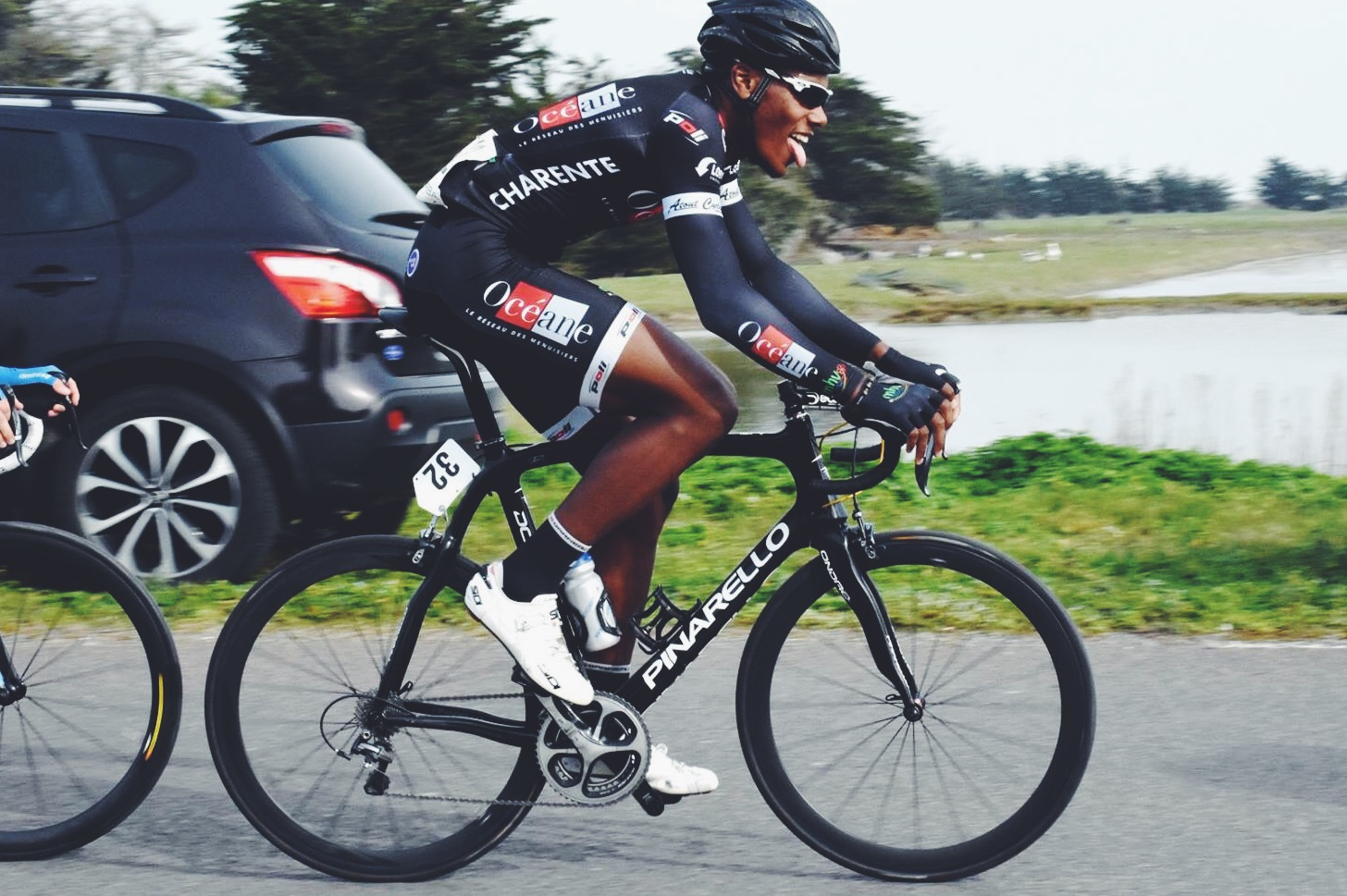 Rousseau a velo